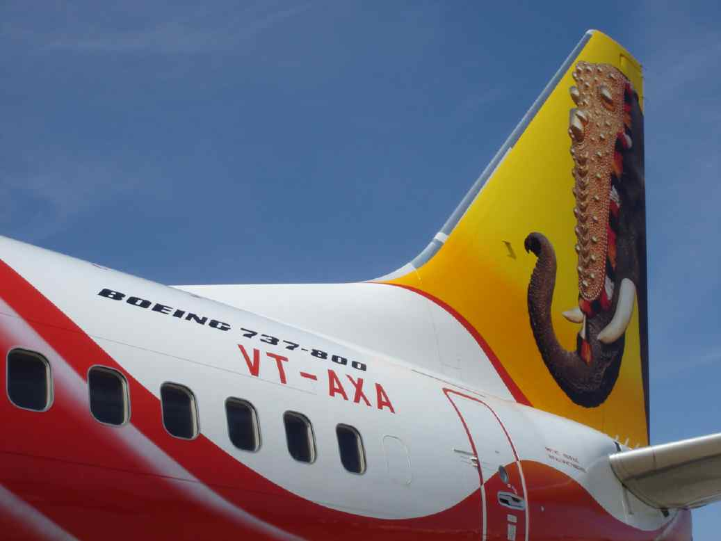 Privates Foto AIE in Salala